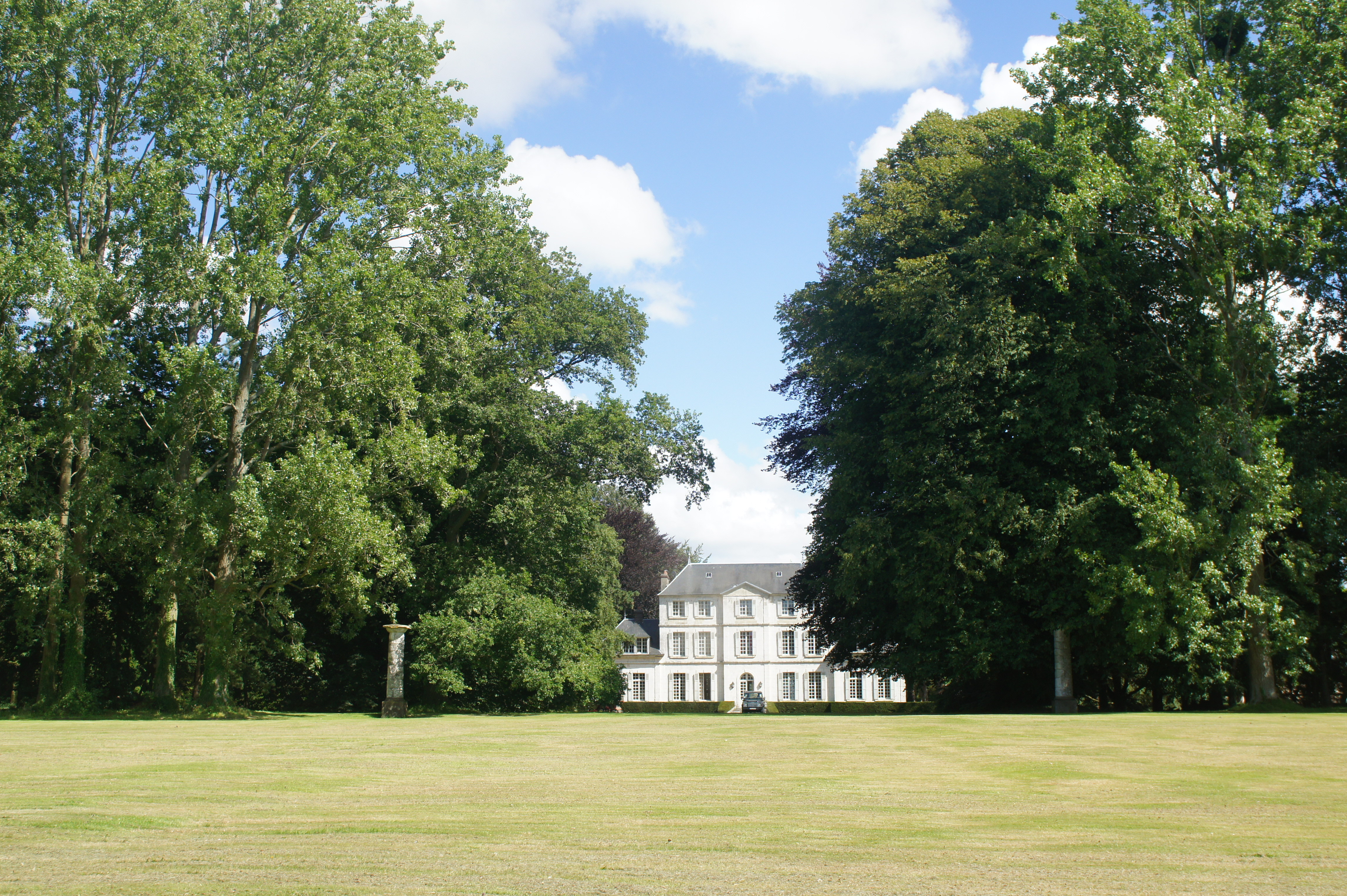 Château Blanc Grainville-Ymauville